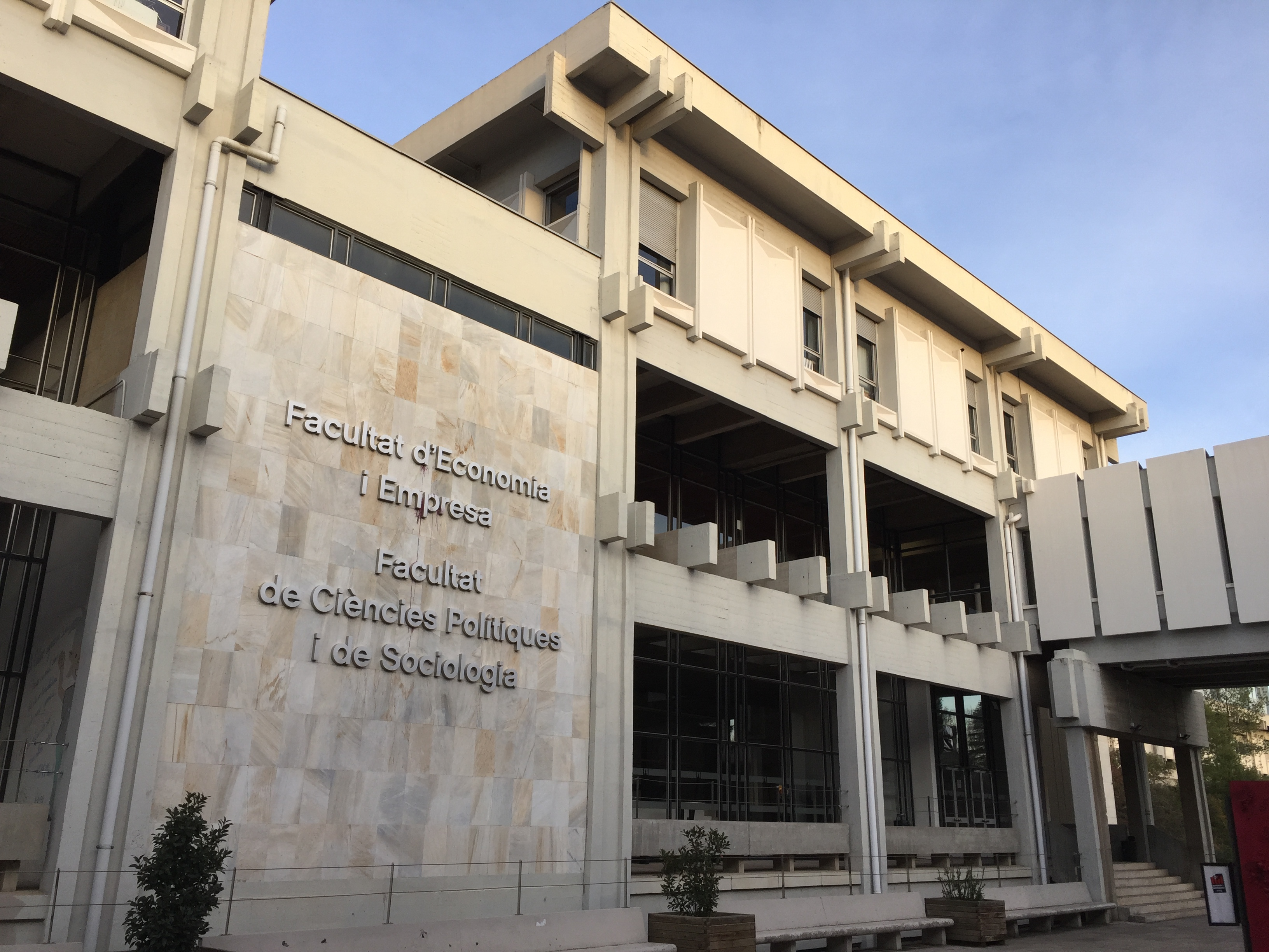 Facultat d'Economia i Empresa i Facultat de Ciències Polítiques i Sociologia UAB